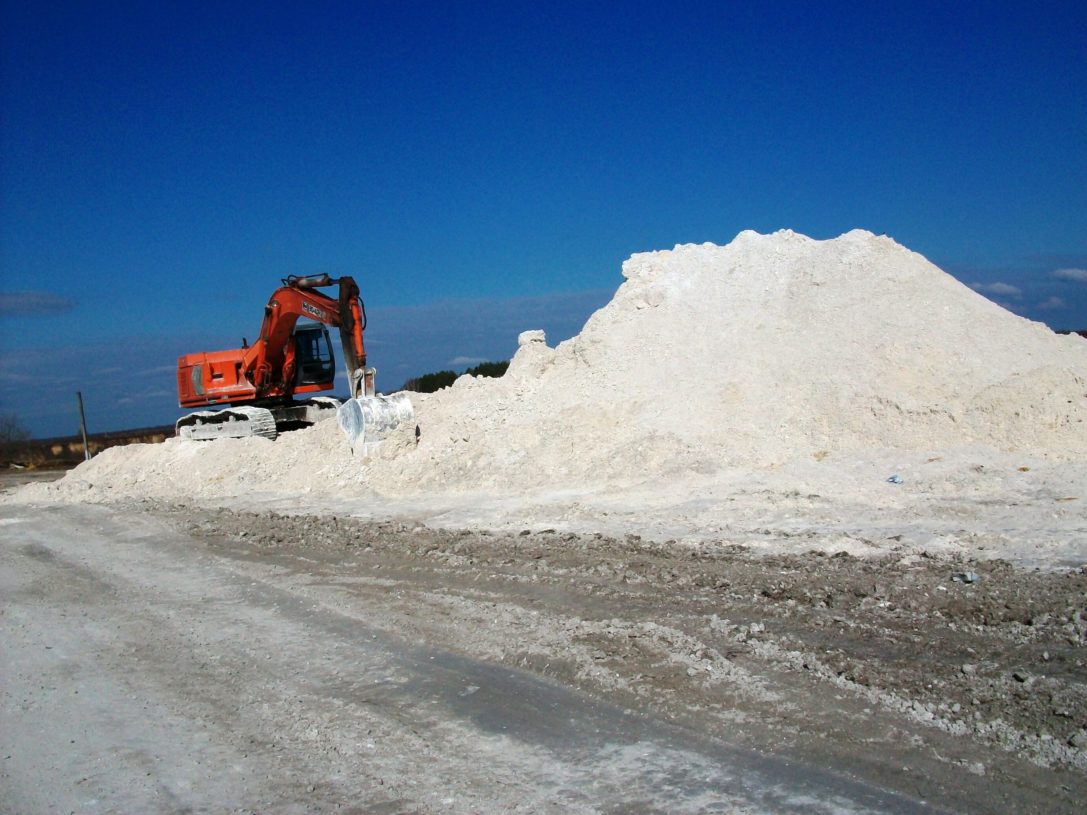 Заруцький кар'єр 2